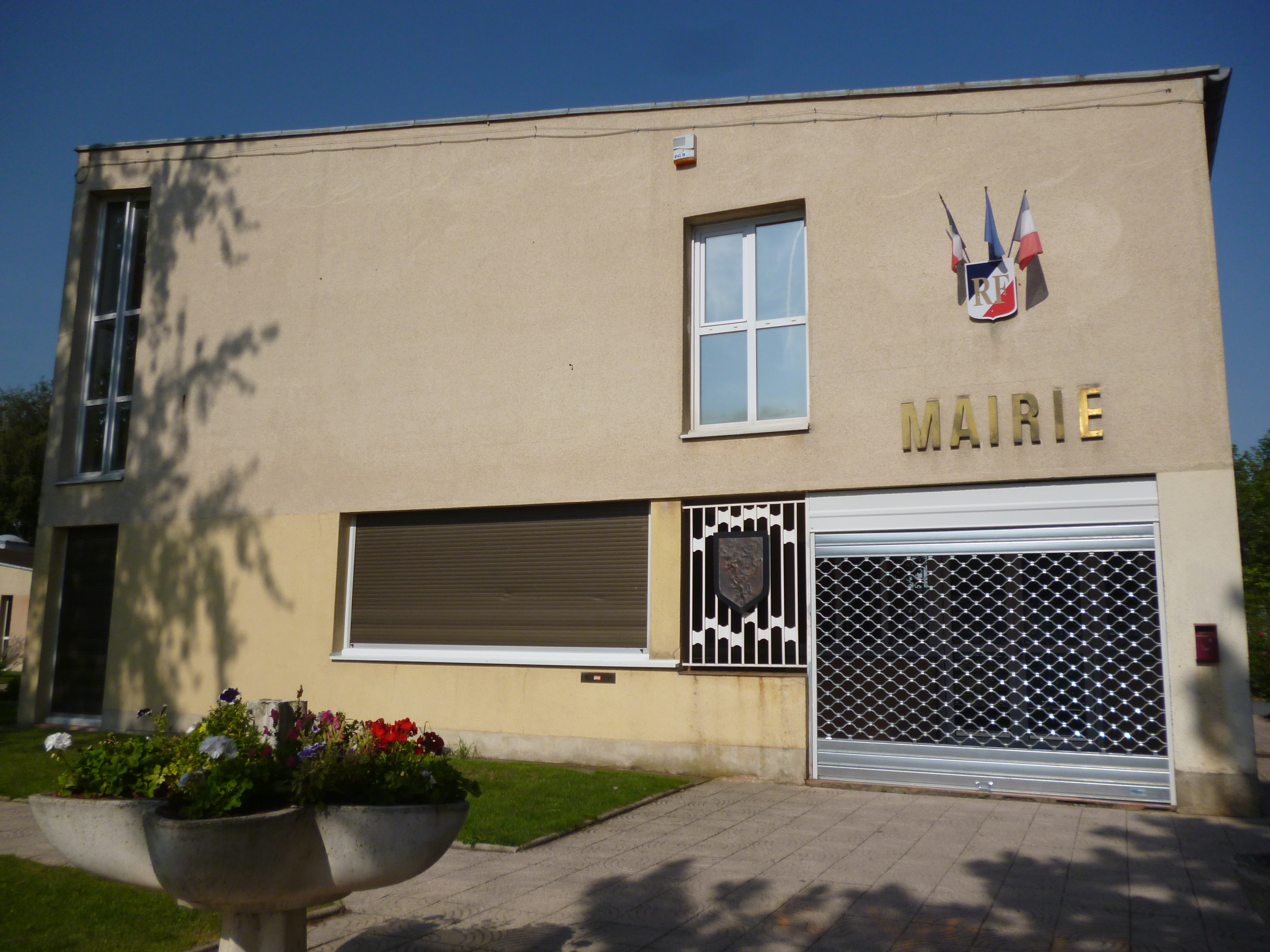 Mairie de Maignelay-Montigny (Oise).